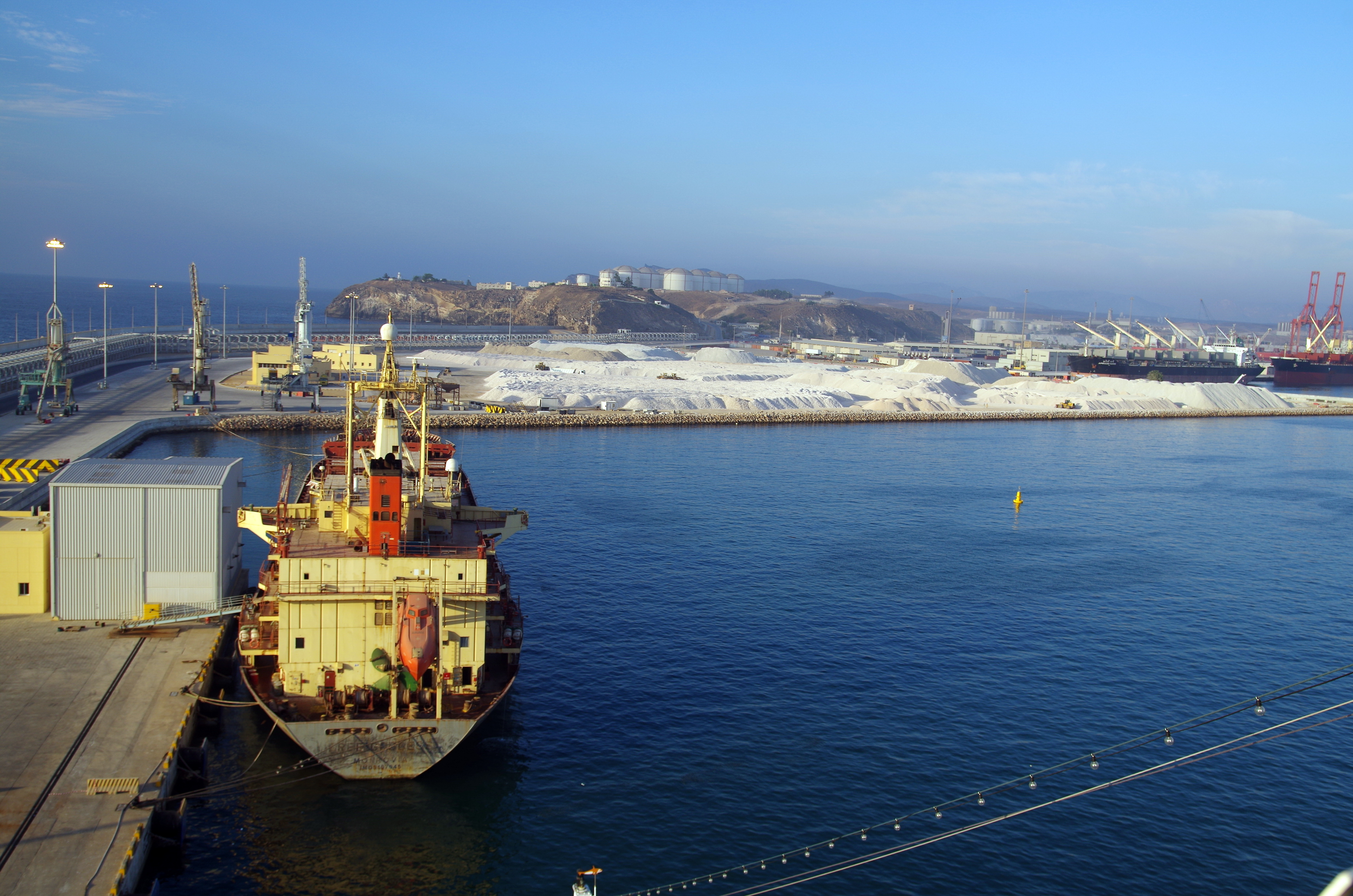 Hafen Salalah